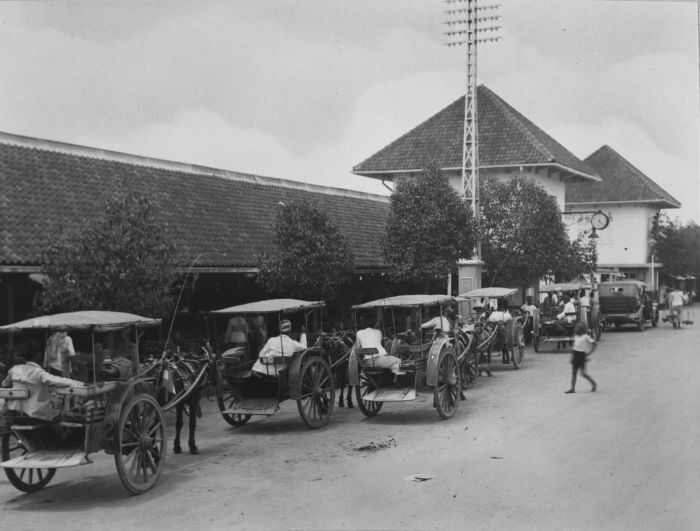 Foto. Bij de pasar van Wonokromo